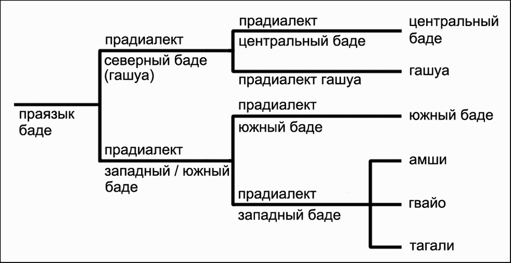 Классификация и историческое развитие диалектов языка баде согласно исследованиям Рассела Шу. Источники: Schuh, Russell G. Using dialect geography to determine prehistory: A chadic case study // Spracheund Geschichte in Afrika. — 1981.